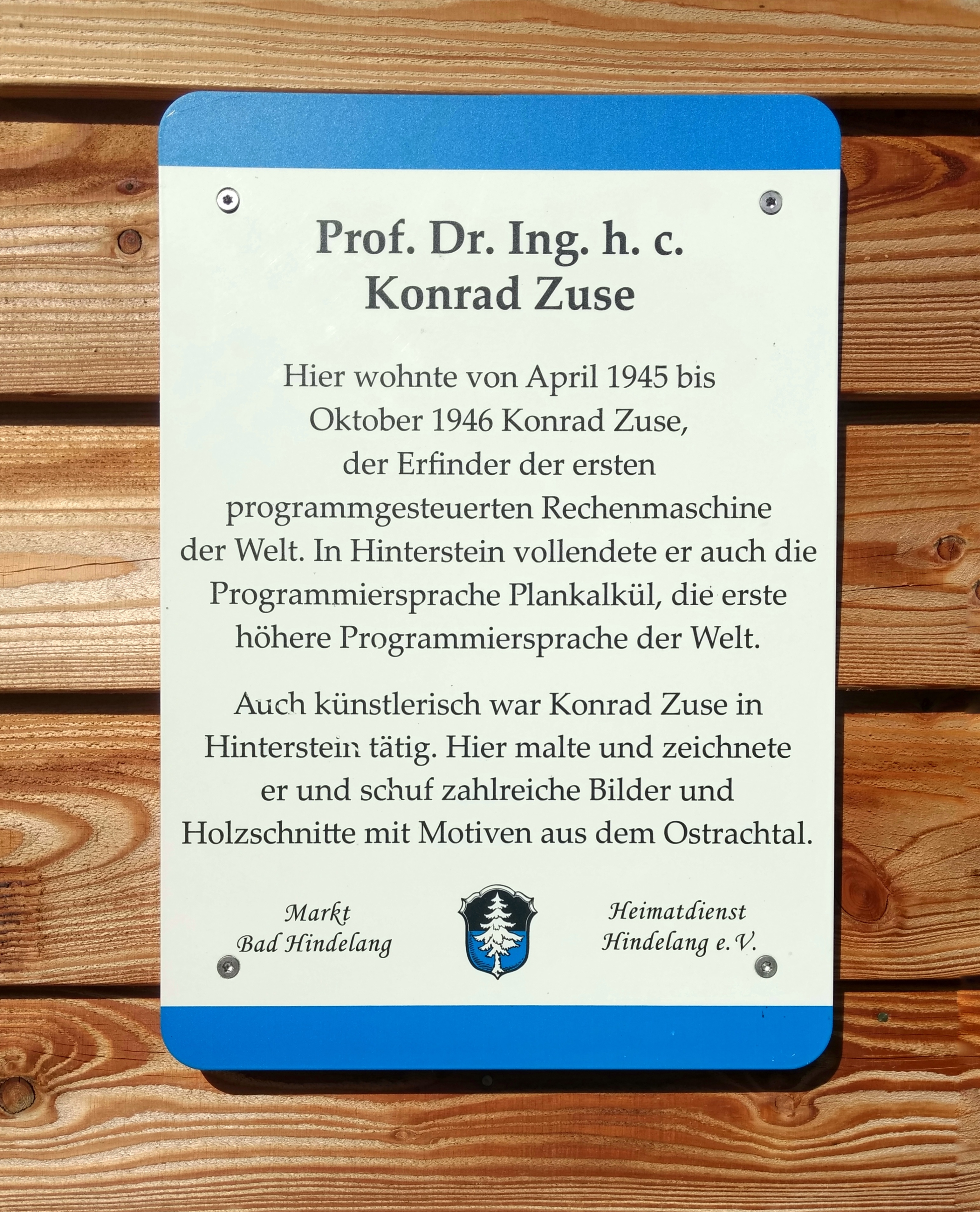 "Konrad-Zuse-Haus" in Hinterstein